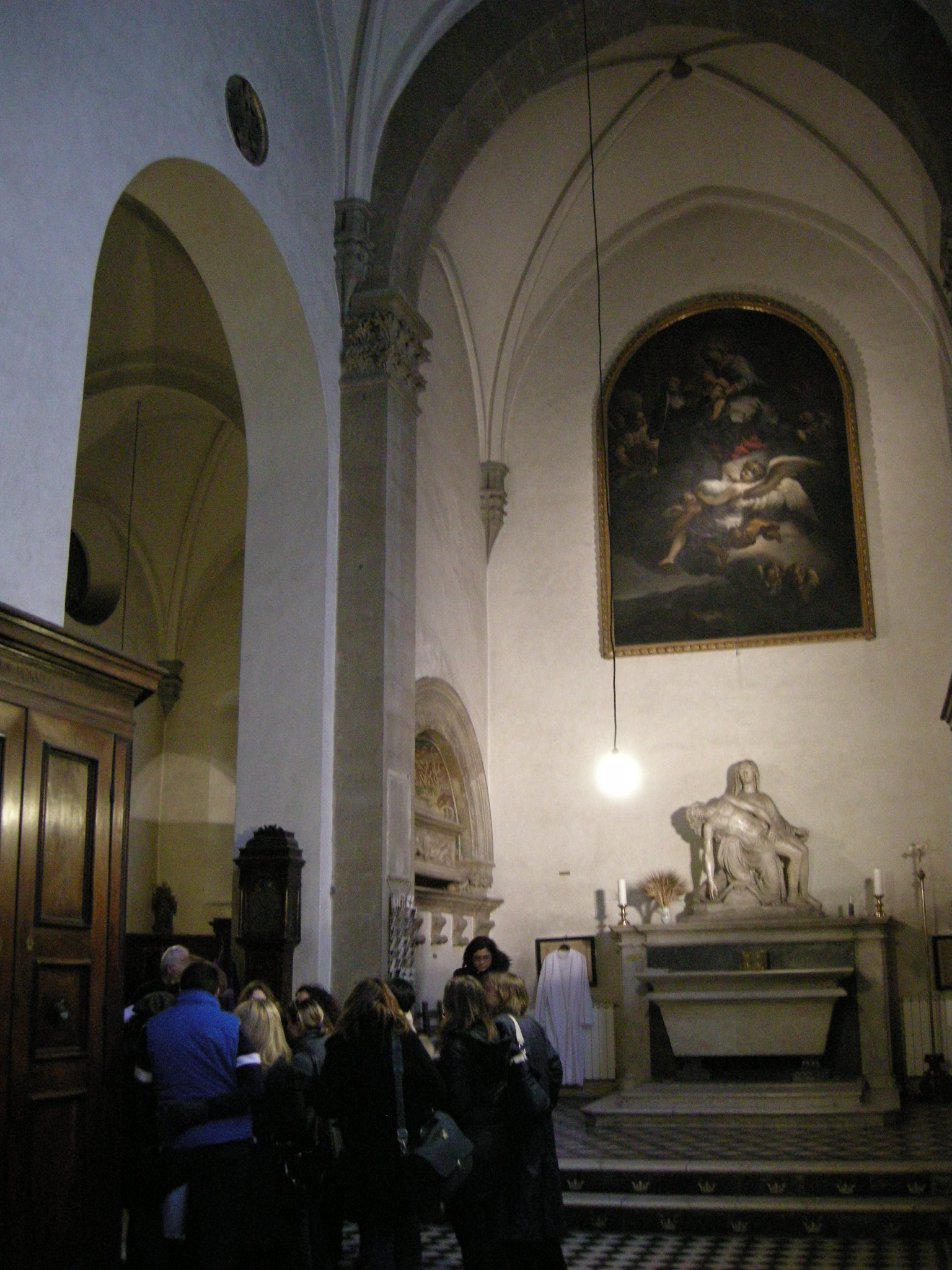 Sagrestia di santa trinita, altare